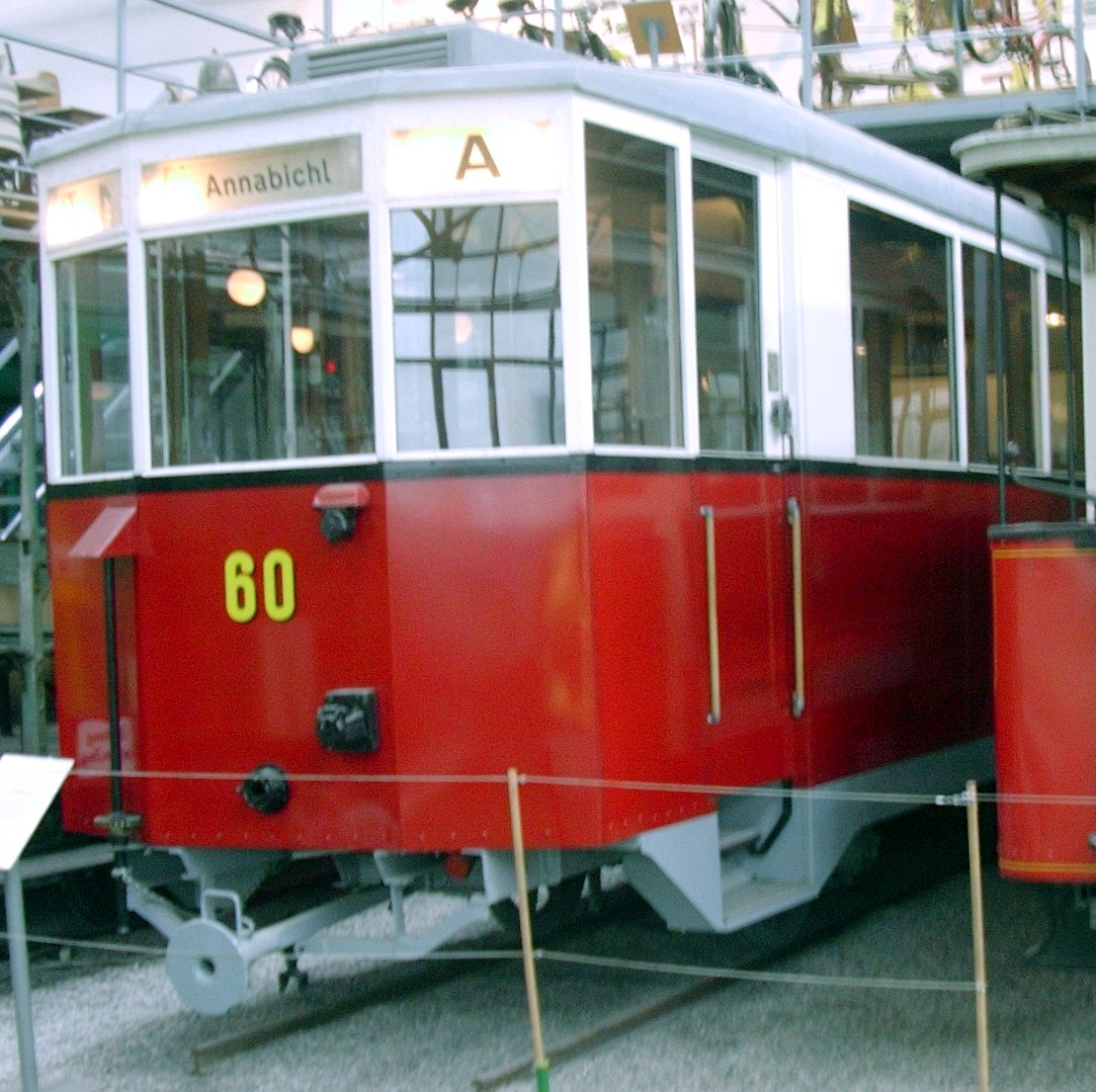 Beiwagen 60 der Straßenbahn Klagenfurt im Historama Ferlach